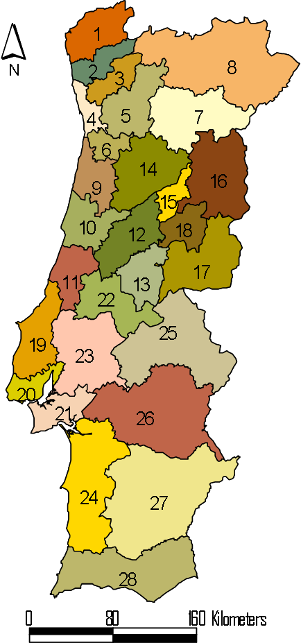 NUTS III de Portugal Continental. Legenda: 1 - Minho-Lima; 2 - Cávado; 3 - Ave; 4 - Grande Porto; 5 - Tâmega; 6 - Entre Douro e Vouga; 7 - Douro; 8 - Alto-Trás-os-Montes; 9 - Baixo Vouga; 10 - Baixo Mondego; 11 - Pinhal Litoral; 12 - Pinhal Interior Norte; 13 - Pinhal Interior Sul; 14 - Dão-Lafões; 15 - Serra da Estrela; 16 - Beira Interior Norte; 17 - Beira Interior Sul; 18 - Cova da Beira; 19 - Oeste; 20 - Grande Lisboa; 21 - Península de Setúbal; 22 - Médio Tejo; 23 - Lezíria do Tejo; 24 - Alentejo Litoral; 25 - Alto Alentejo; 26 - Alentejo Central; 27 - Baixo Alentejo; 28 - Algarve